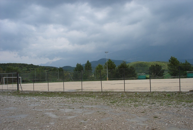 Staurodromi Groud Achaea GreeceΓήπεδο Σταυροδρομίου